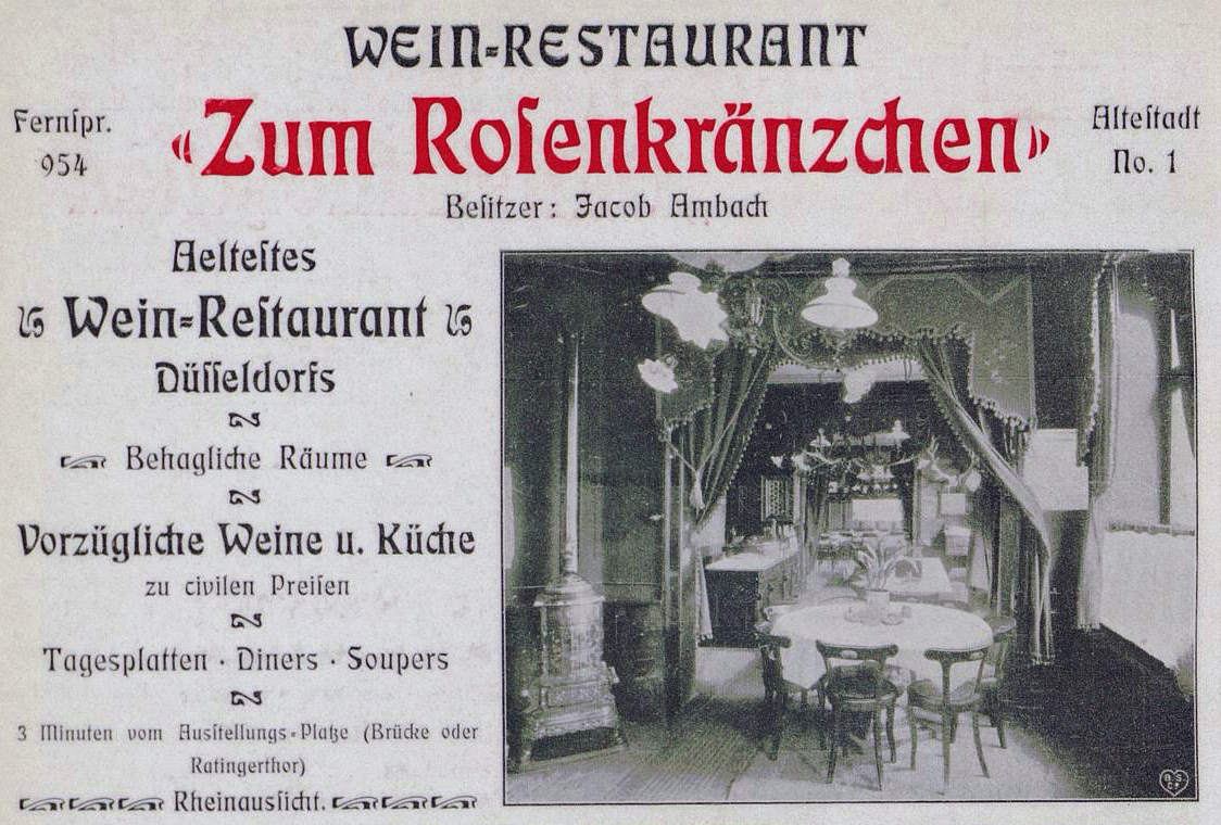 Wein-Restaurant "zum Rosenkränzchen", Besitzer Jacob Ambach, Altestadt No. 1, Anzeige in Adressbuch Düsseldorf 1902